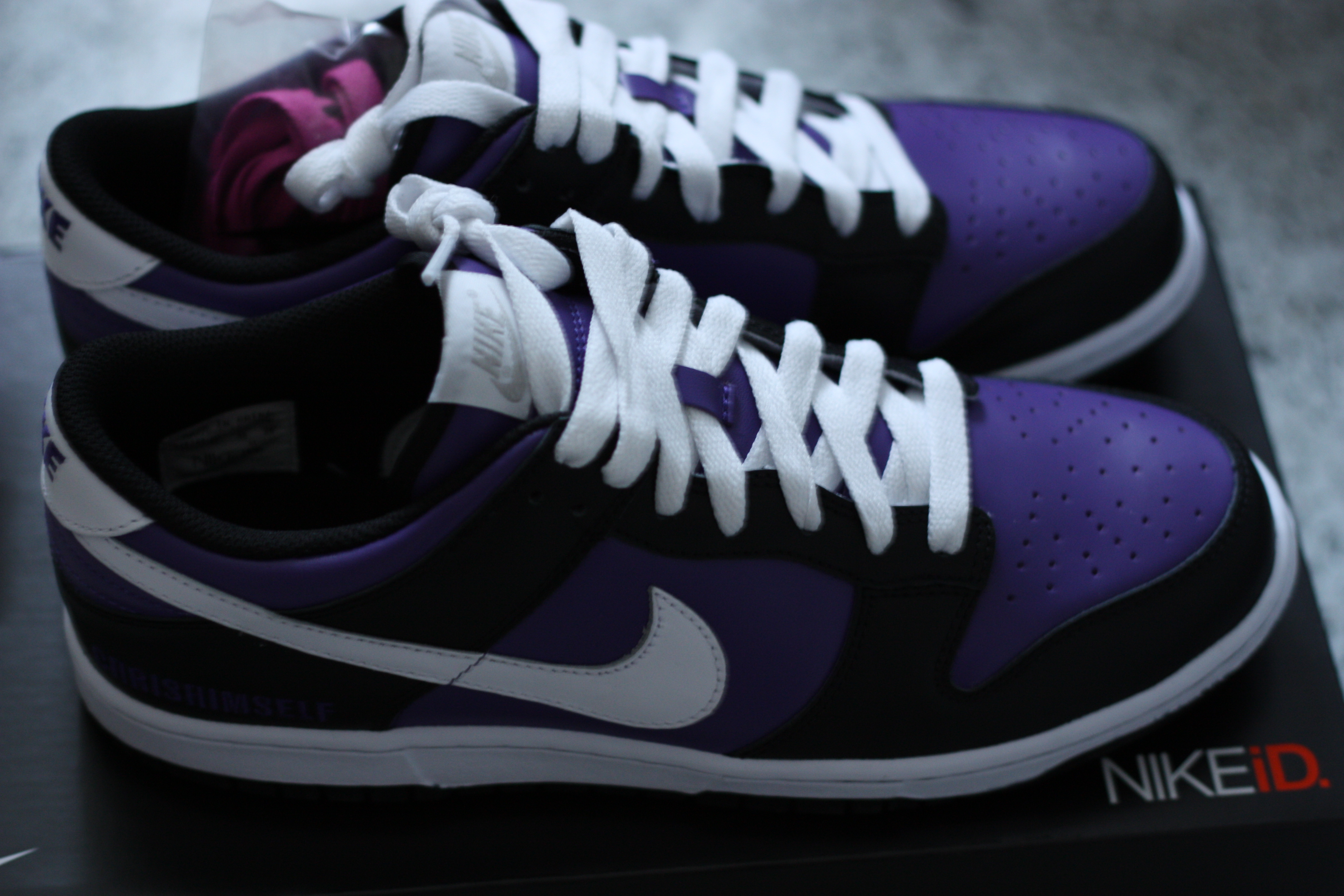 nikeID x Chrishimself